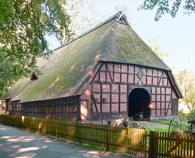 Heidemuseum Walsrode Rischmannshof The Rischmannshof Heath Museum, Walsrode, Lower Saxony, Germany.